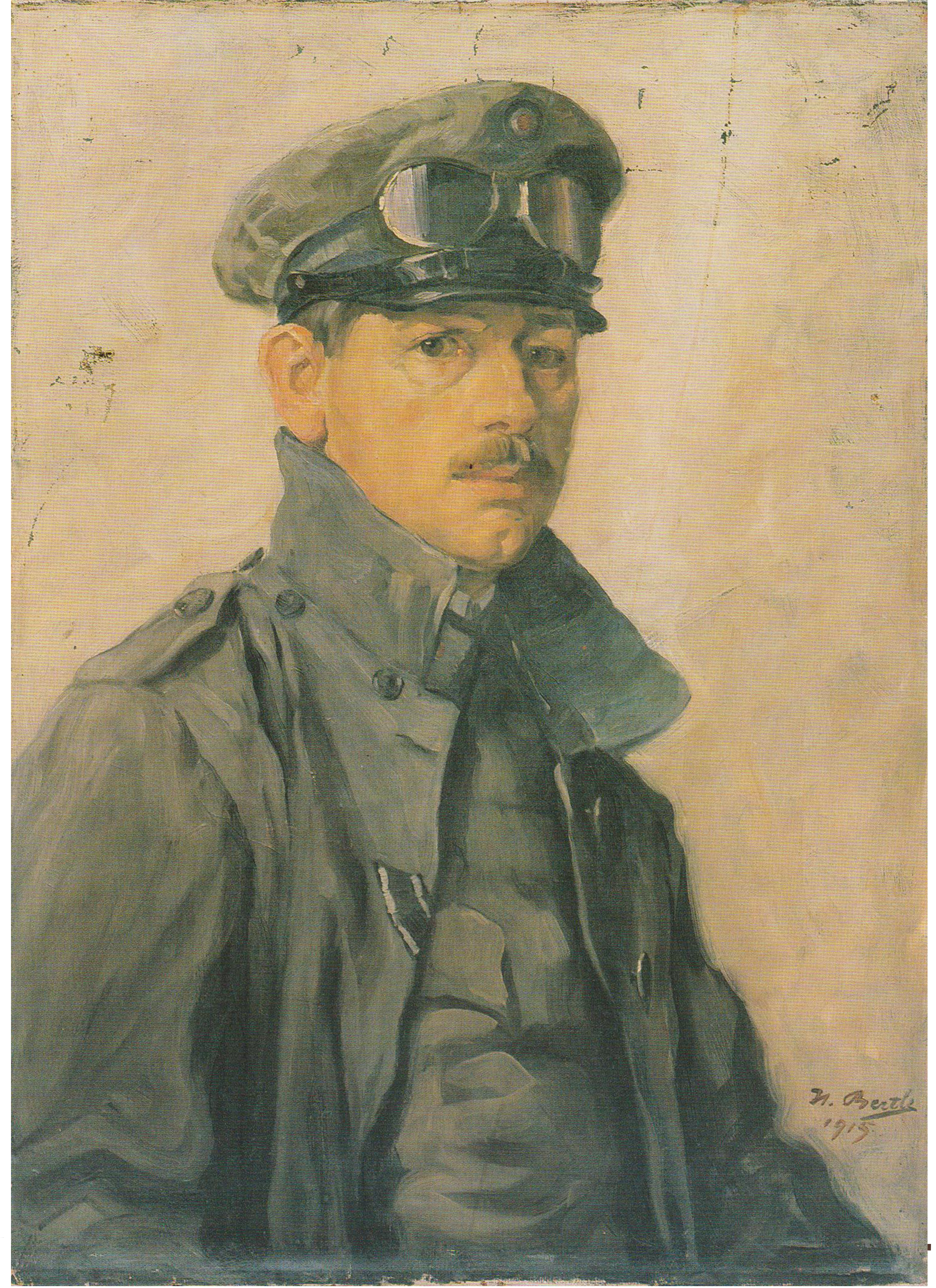 Bild "Selbstbildnis" von 1915